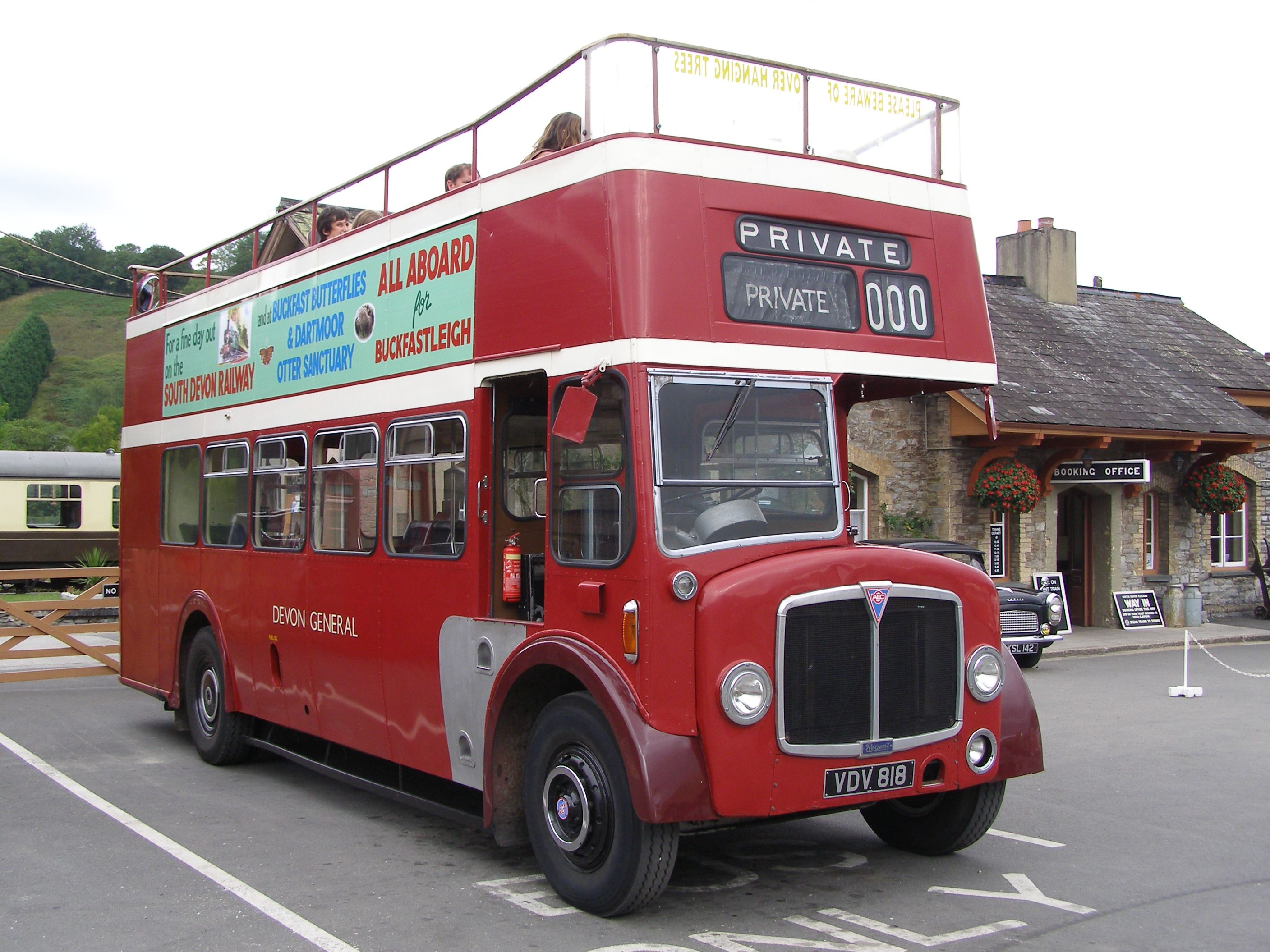 A Devon General 1957-built AEC Regent V bus (VDV 818)